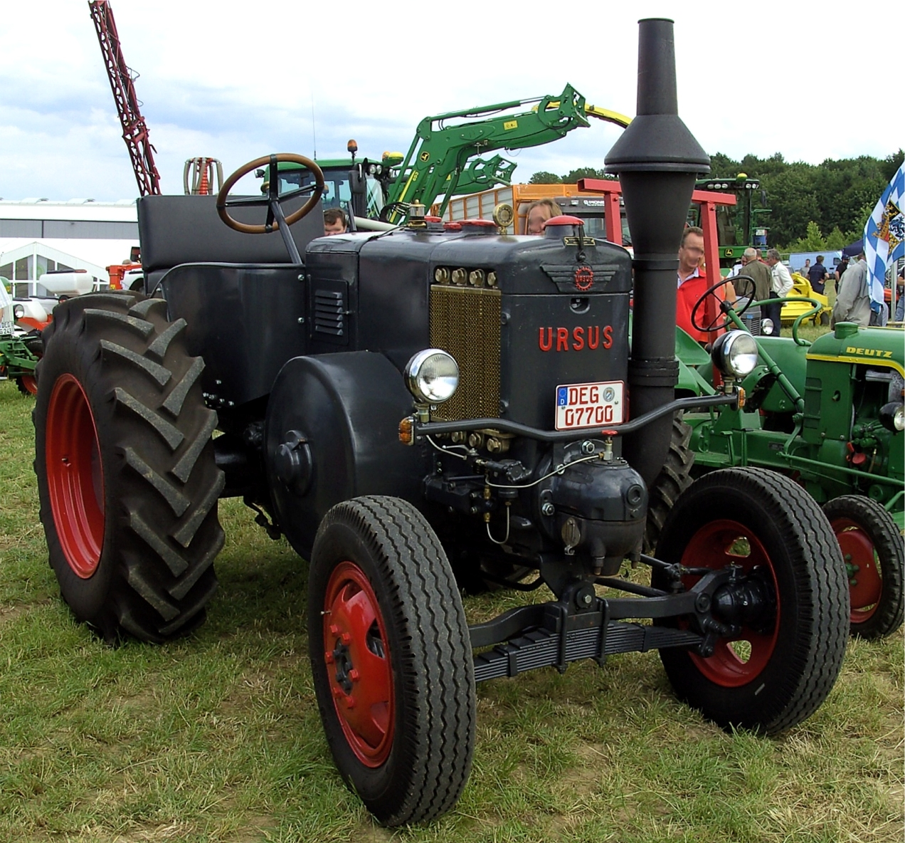 Polnischer Traktor Ursus C-45.